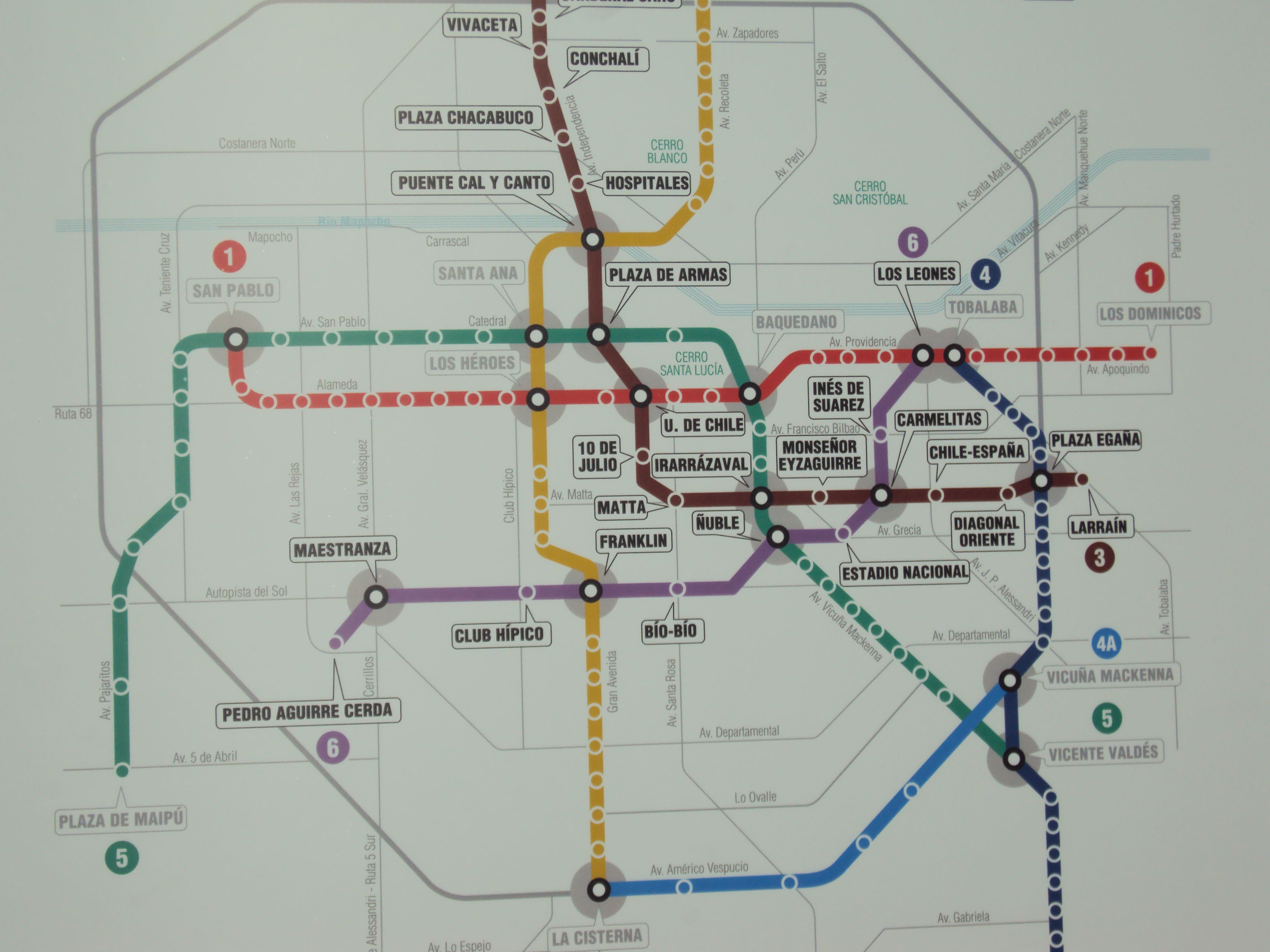 Plano de futuros recorridos de las líneas 3 y 6 del Metro de Santiago.